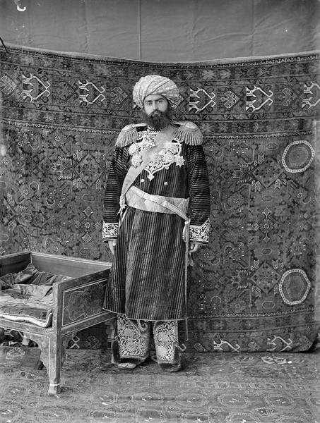 Сеид-Абдул-Ахад-хан, эмир Бухары